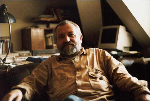 Prof. PhDr. Mojmír Horyna, CSc., významný český historik umění